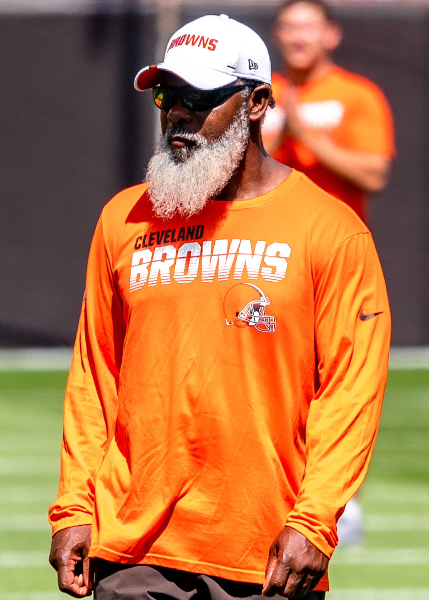 Stump Mitchell